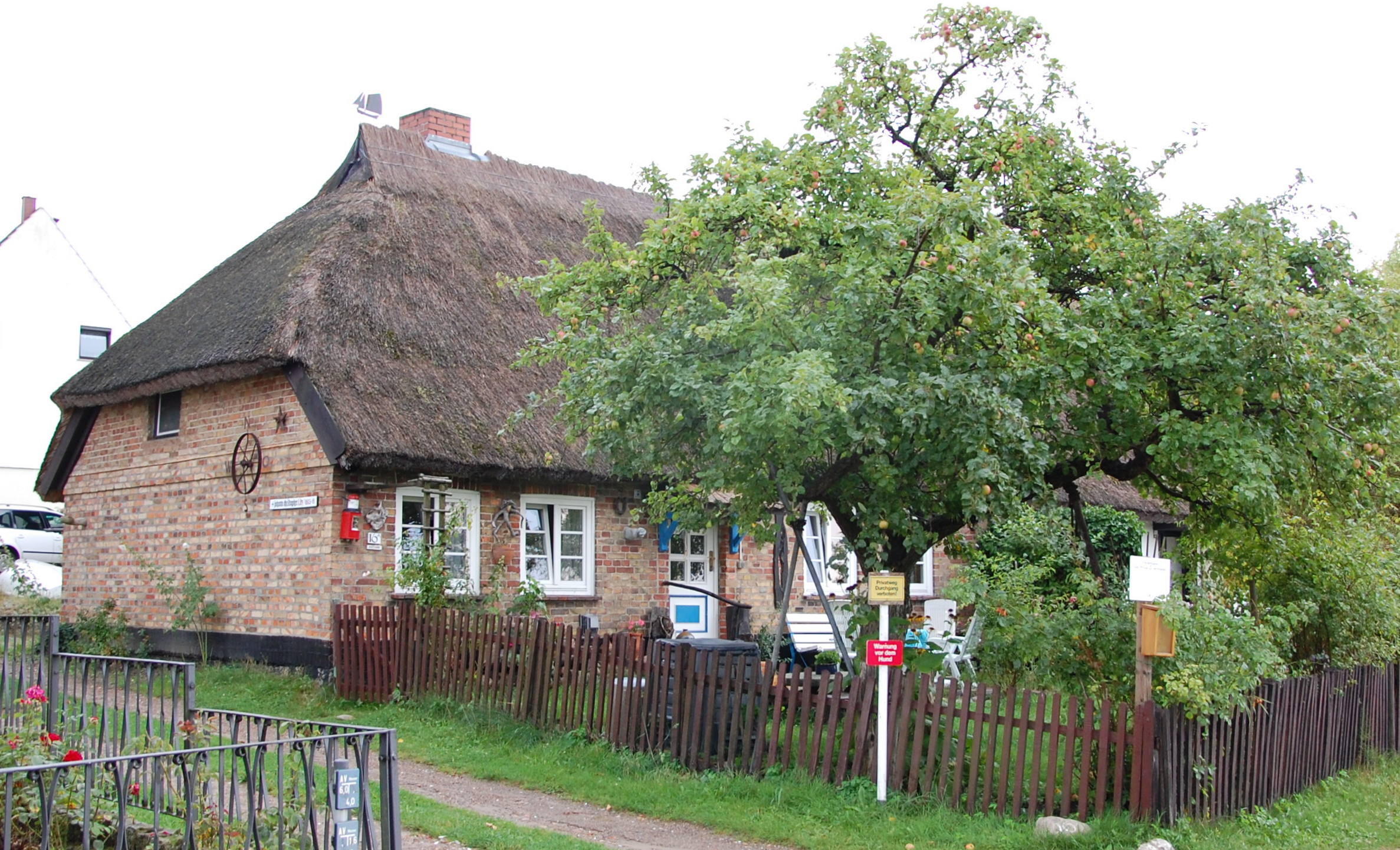 Seedorf Straße 16-17